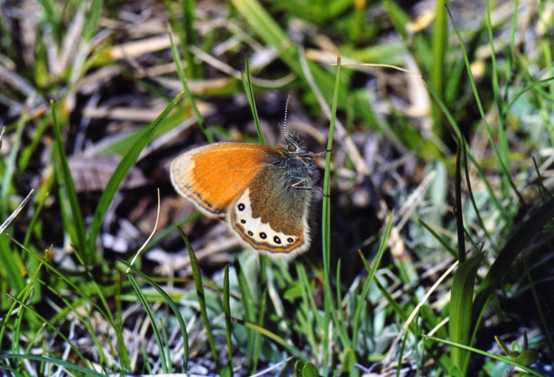 le satyrion. insecte lépidoptère (papillon)